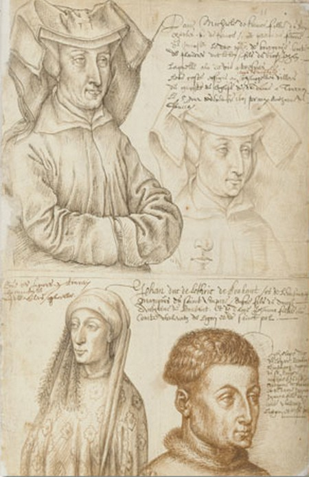 Dessin ornant les Mémoriaux d'Antoine de Succa.